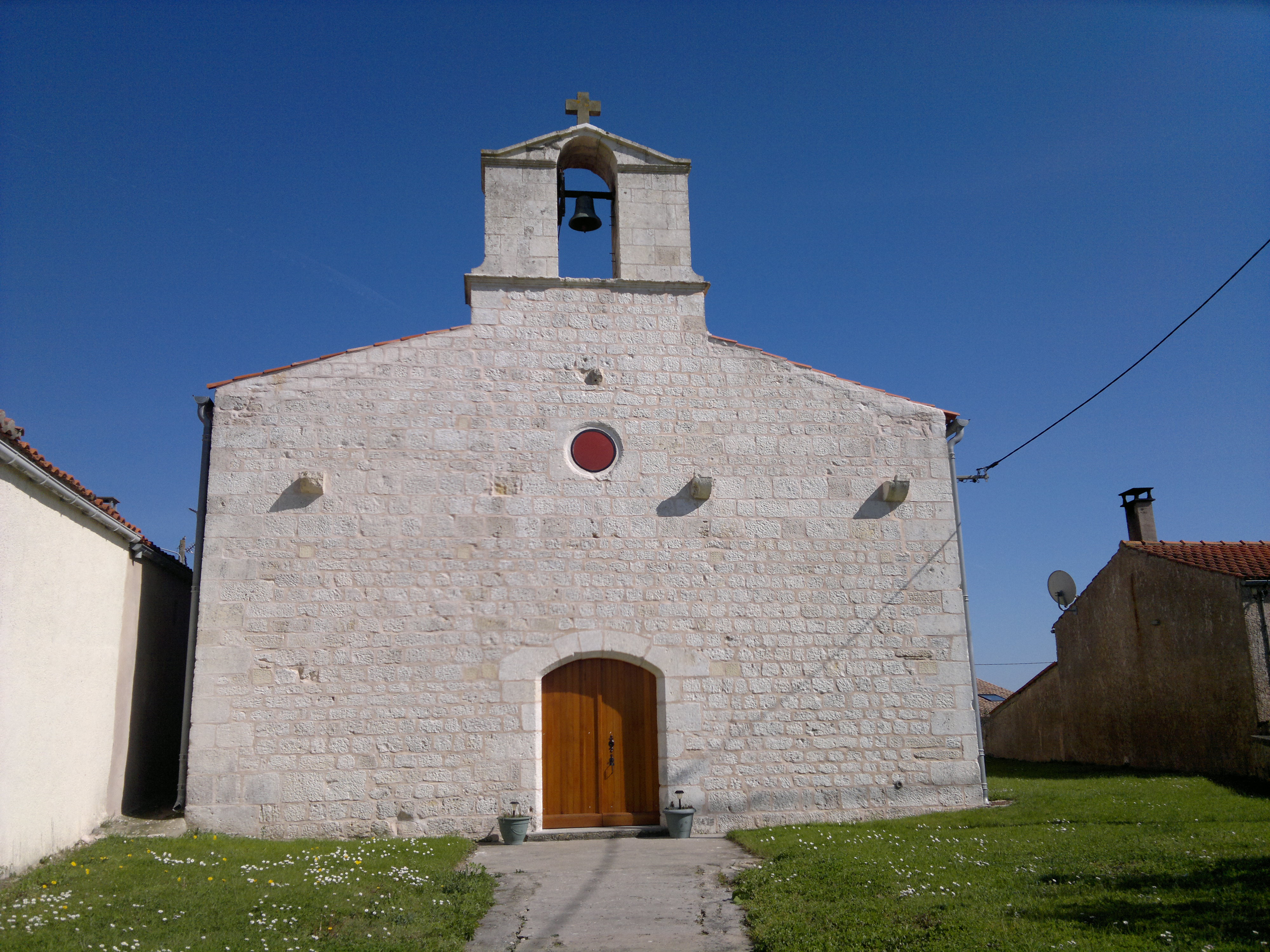 Église, Fr-17-Saint-Froult.